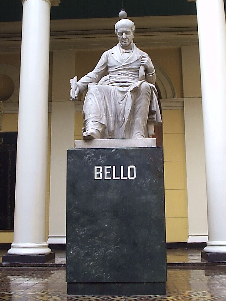 Estatua de Andrés Bello en la Casa Central de la Universidad de Chile